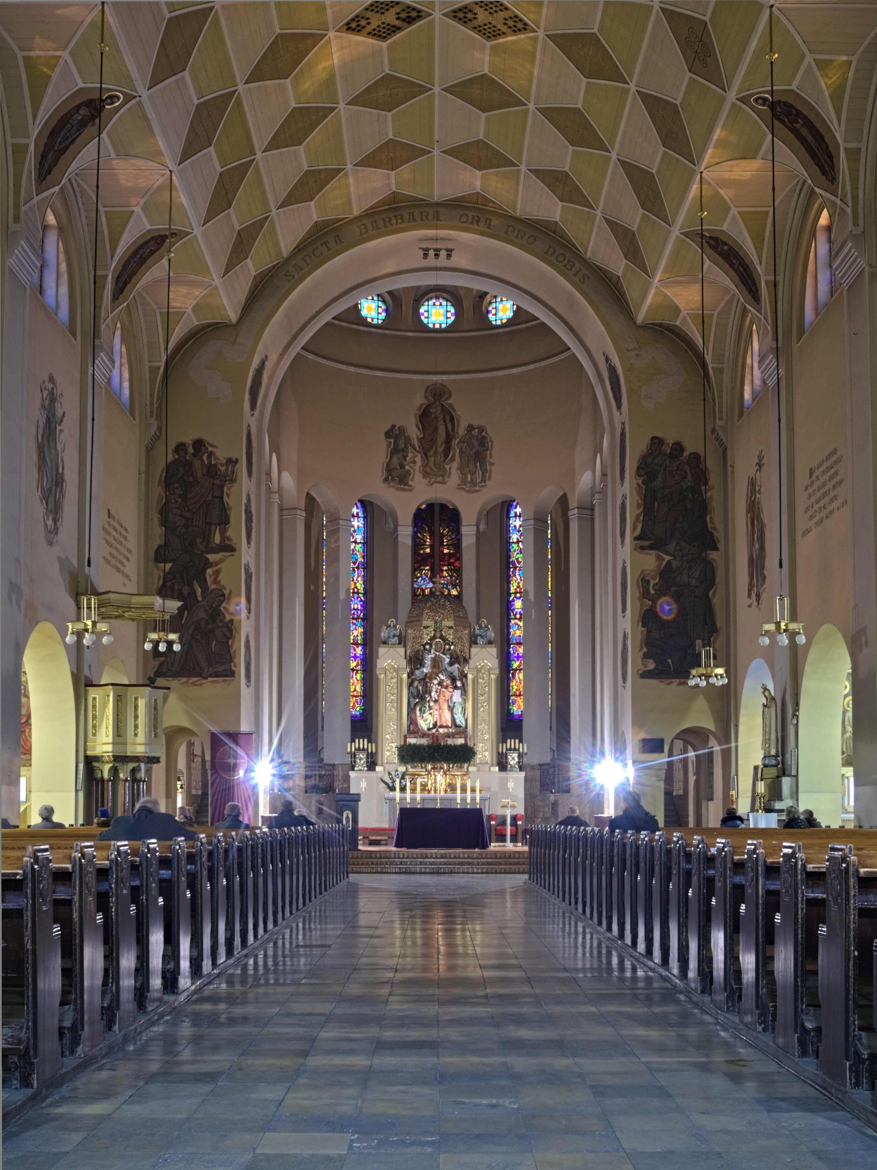 nawa główna kościoła św. Barbary w Bytomiu, zdjęcie wykonane przed mszą świętą, większość świateł jest wyłączona